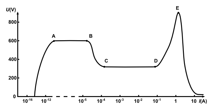 Plasma voltamperkarakteristik